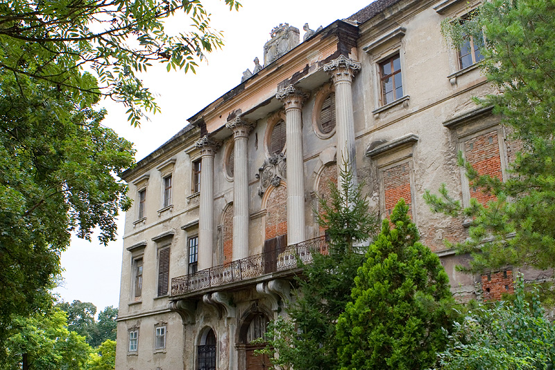 Schloss Thürnthal, Niederösterreich